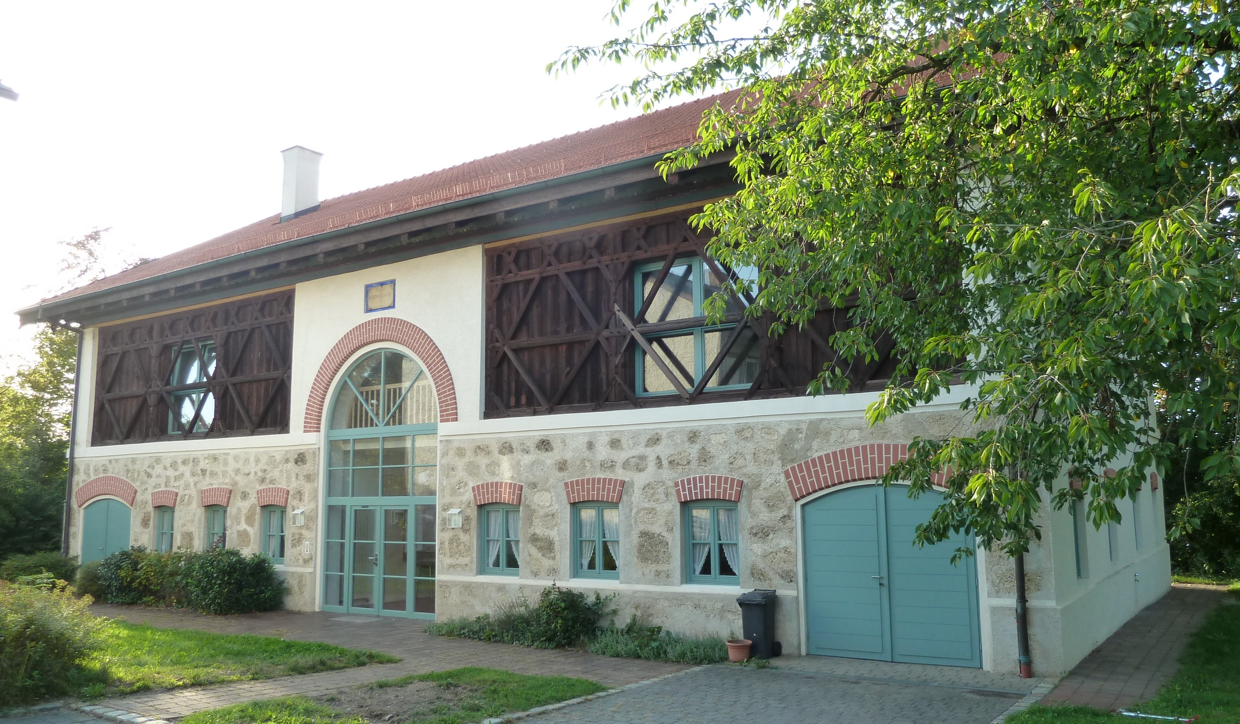 Historischer, renovierter Pfarrstadl des Pfarrhofs Flossing mit integrierter Schulturnhalle